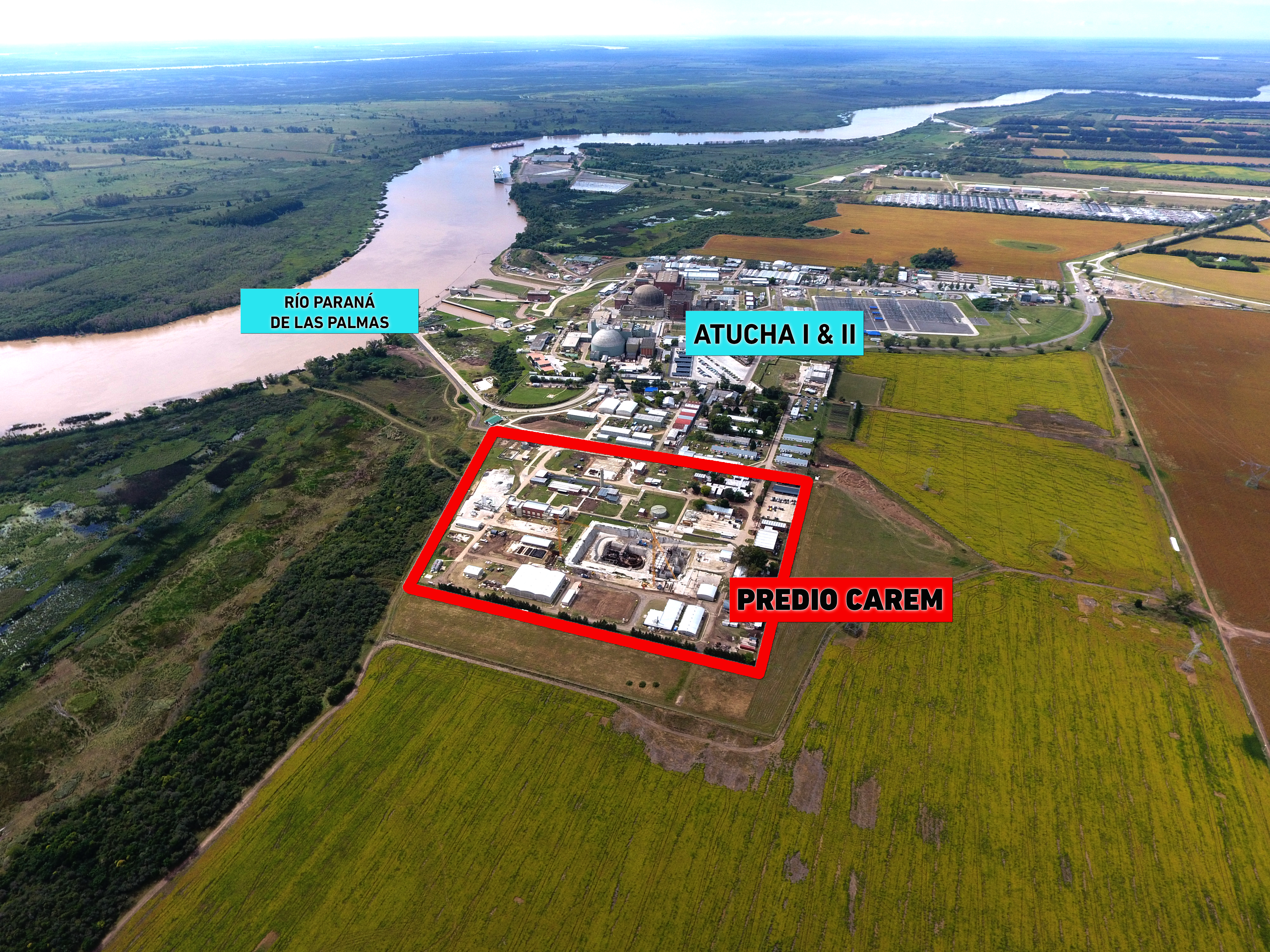 Vista aérea del Complejo Nuclear Atucha, donde se encuentra el sitio de emplazamiento del Prototipo CAREM25